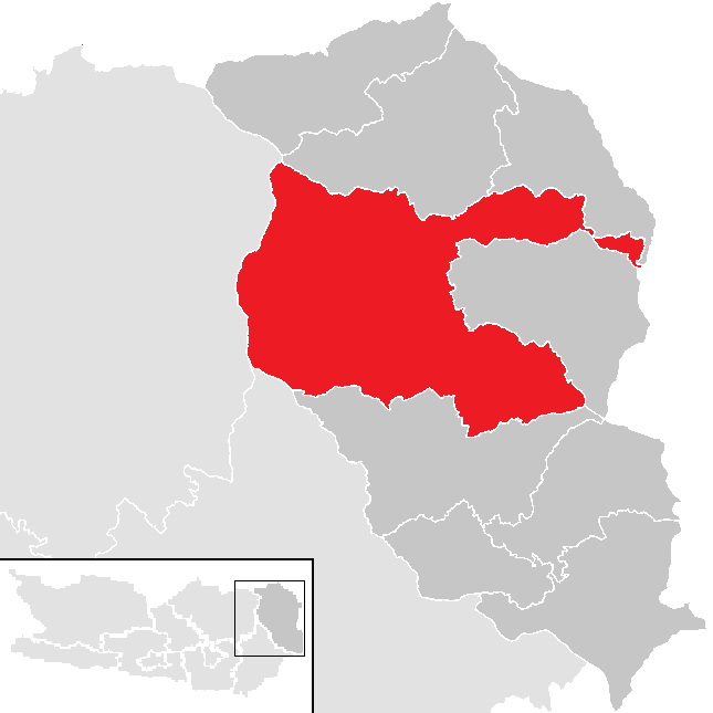 Bezirk Wolfsberg